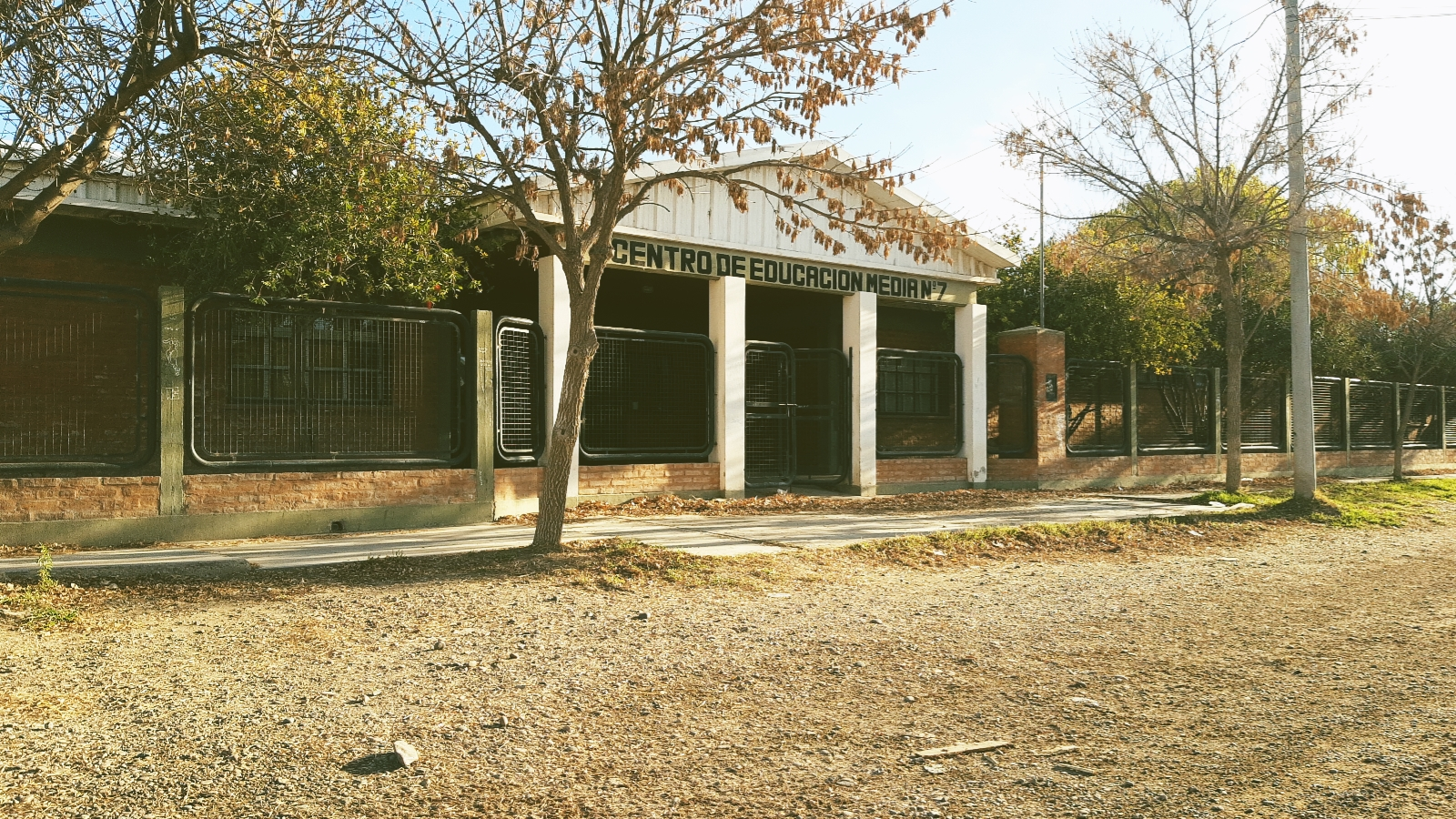 foto de escuela